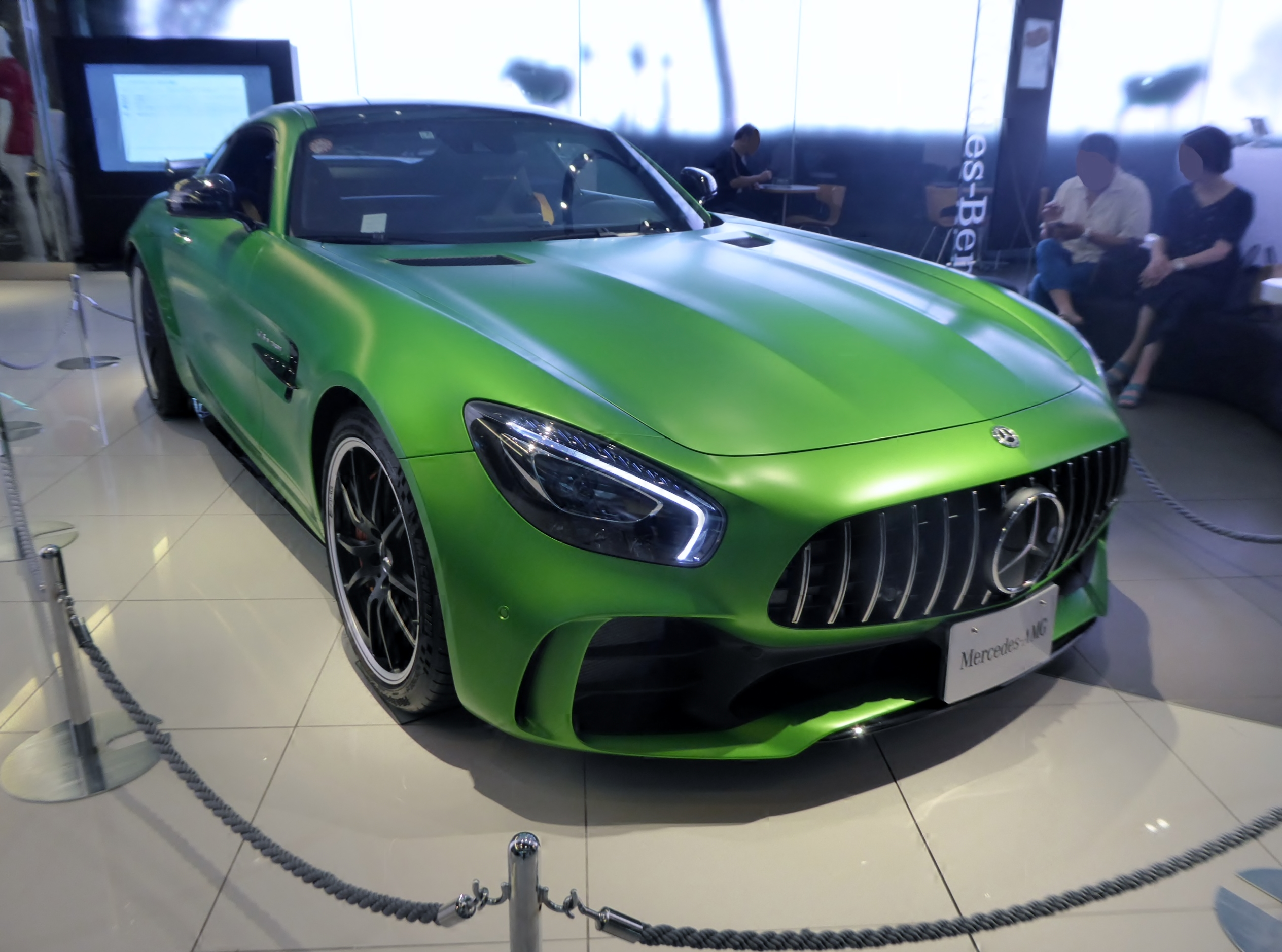 C190系メルセデスAMG・GT Rをフロントから撮影。